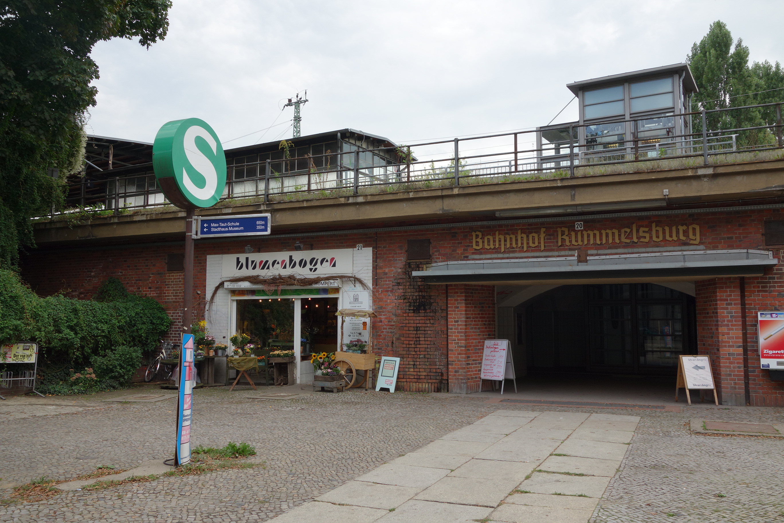 Bahnhof Berlin-Rummelsburg (S-Bahn), Zugang Nord